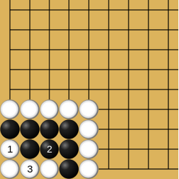 bataille de ko virtuelle au jeu de go, après la fin de la partie